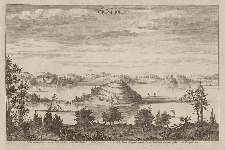 Titel i svensk övers. : Lämningar av Gröneborg